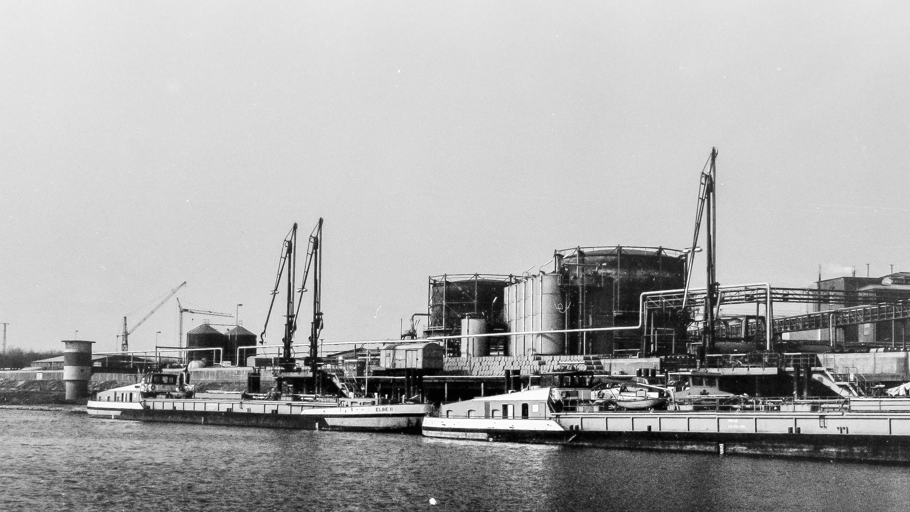 Unichema, Emmerich. Werkshafen, die "Elbe I" und "Elbe II" liegen vor Anker